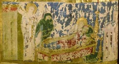 Кончина святой Горгонии (Творения Григория Назианзина [gr. 510], л. 43 об. )